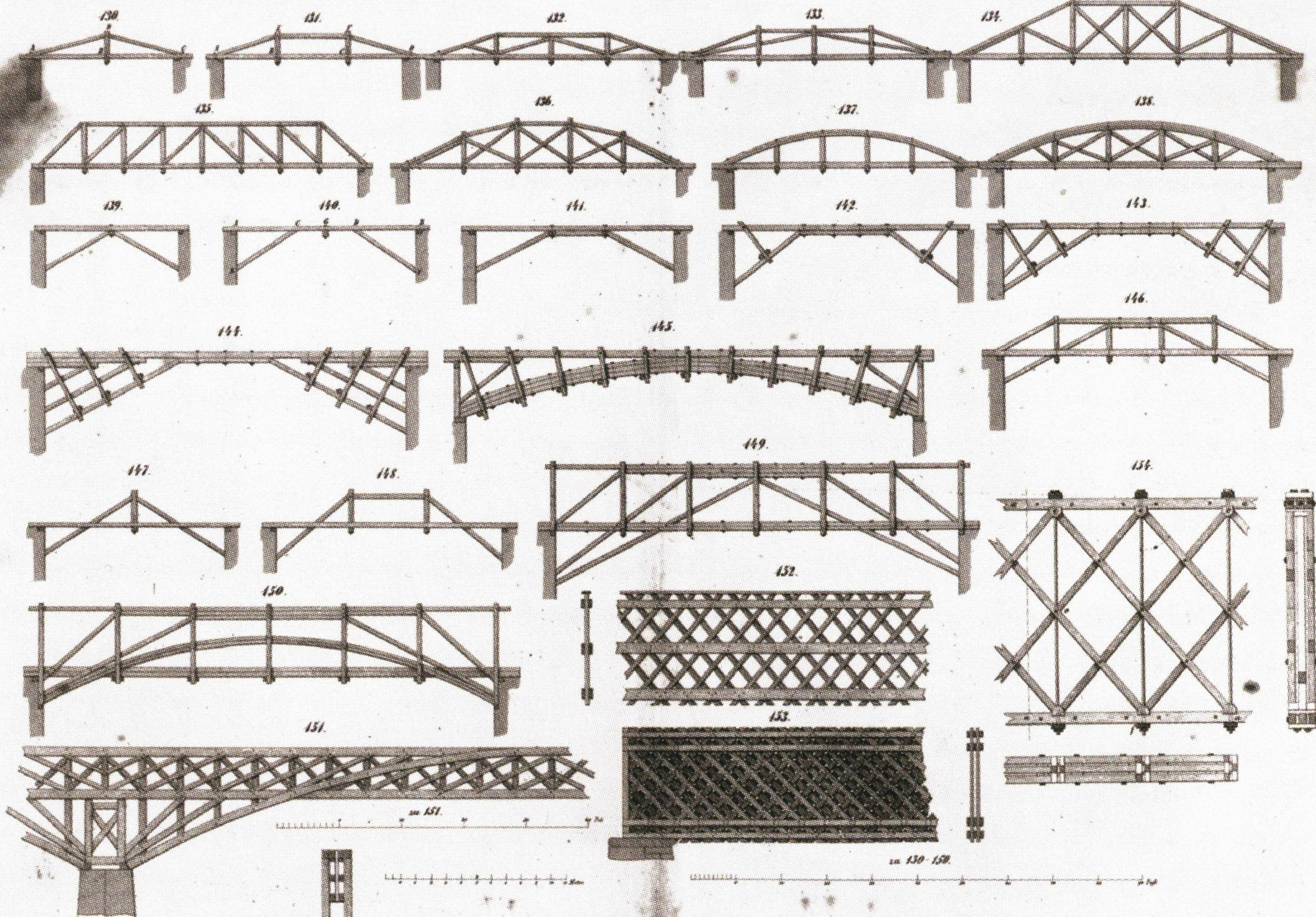 Gespärer am Bréckebau aus XXV Tafeln zur allgemeinen Baukunde vum Max Becker 1853 zu Stuttgart eraus komm.